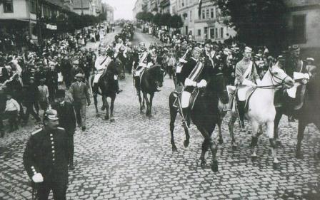 ATV Gotha